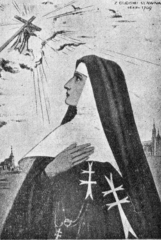 Histoire de l'Ordre Hospitalier du Saint-Esprit Auteur Paul Brune Éditeur C. Martin, 1892